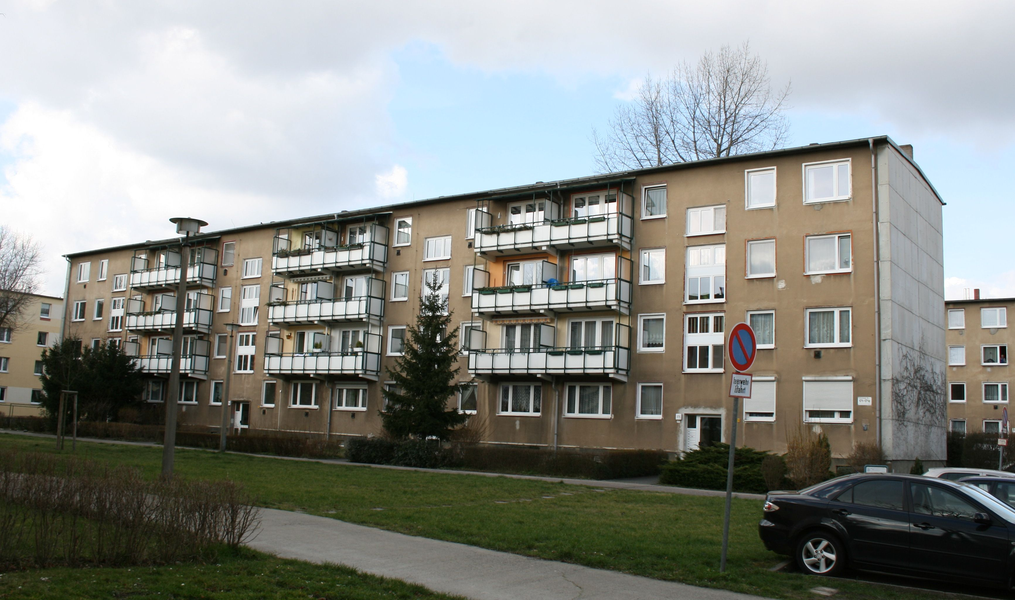 Q3A Plattenbau (Front), Falkenberger Str., Berlin, Germany